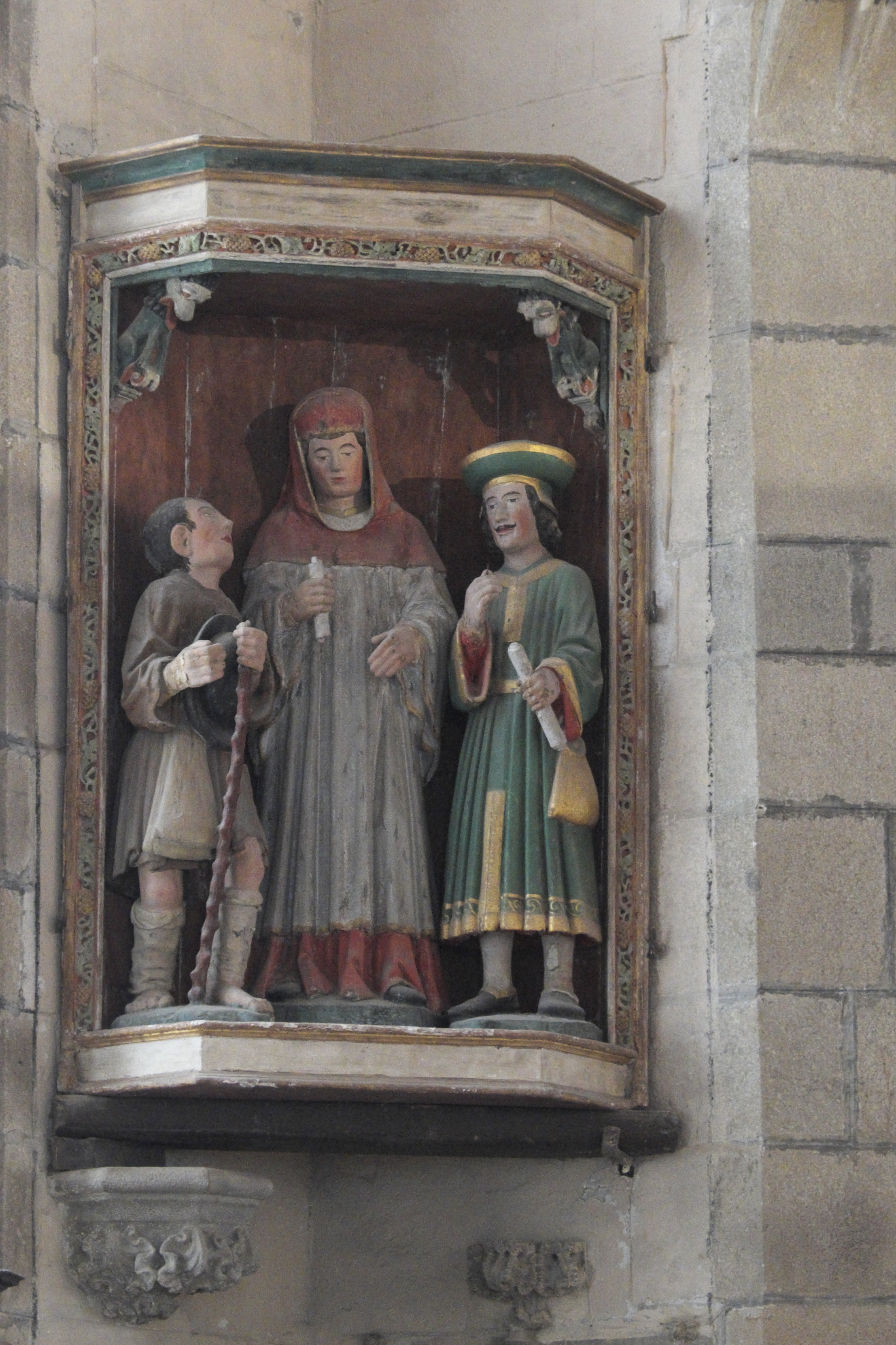 Katholische Pfarrkirche Saint-Yves in La Roche-Maurice im Département Finistère (Region Bretagne/Frankreich)